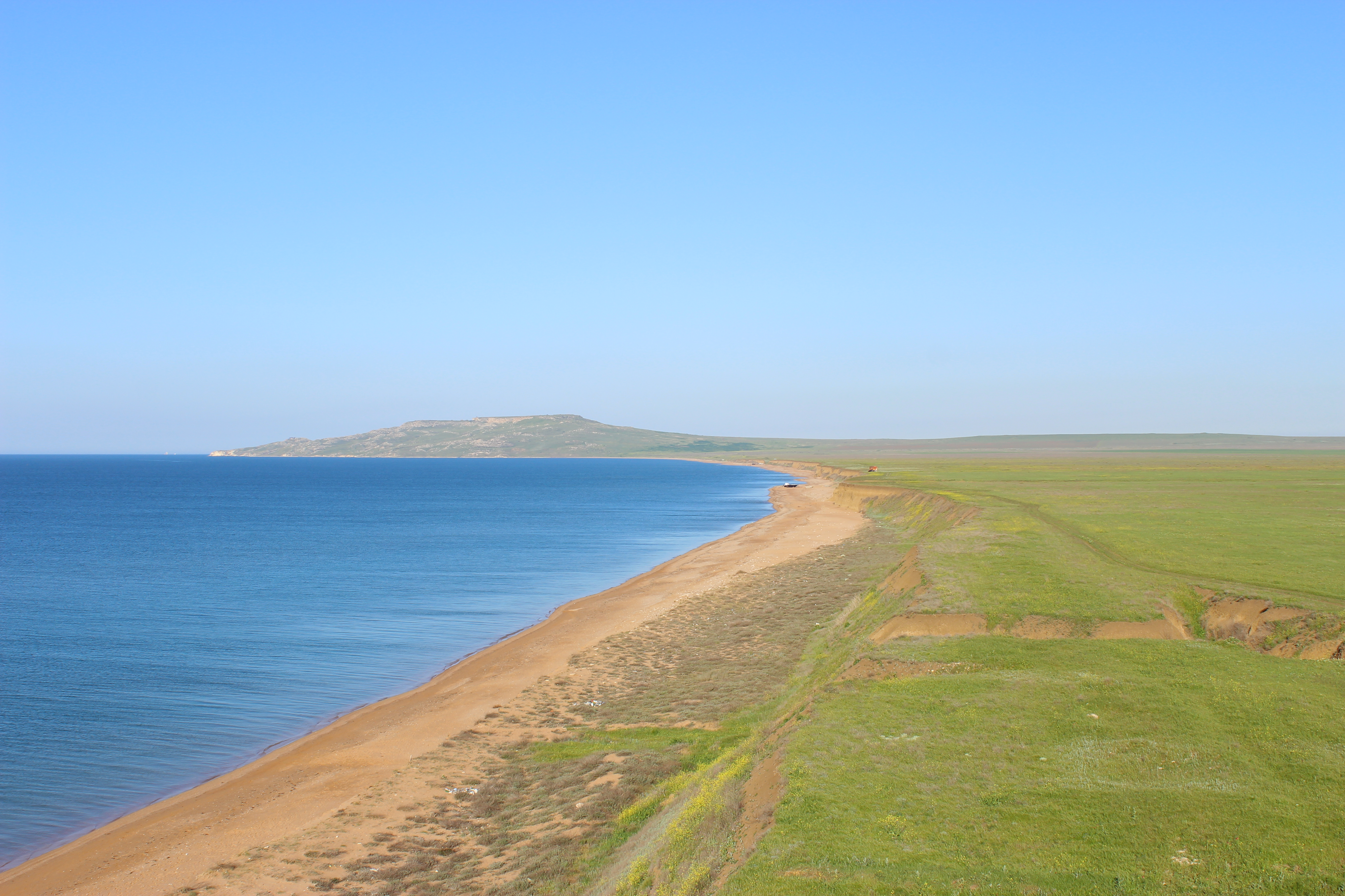 Опукський ПЗ, Ленінський р-н, с. Яковенкове, вул.. Чорноморська, 1а